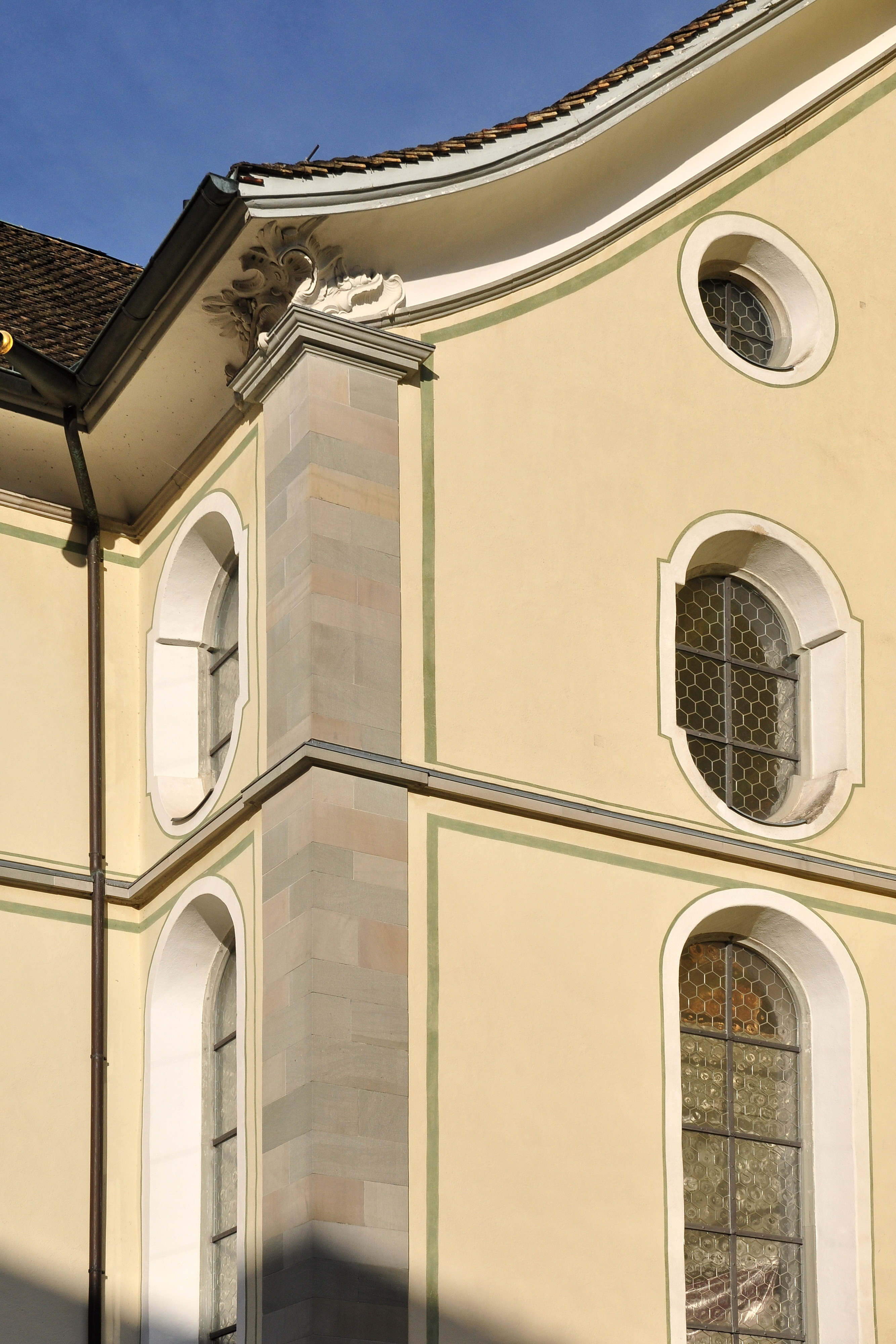 Reformierte Kirche, Schönenbergstrasse 9 in Wädenswil (Switzerland)